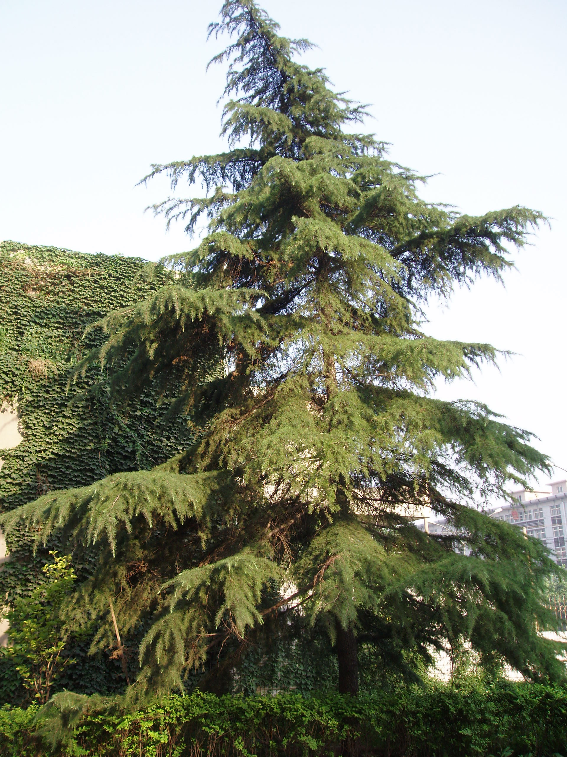 Korean fir Cedrus deodara.